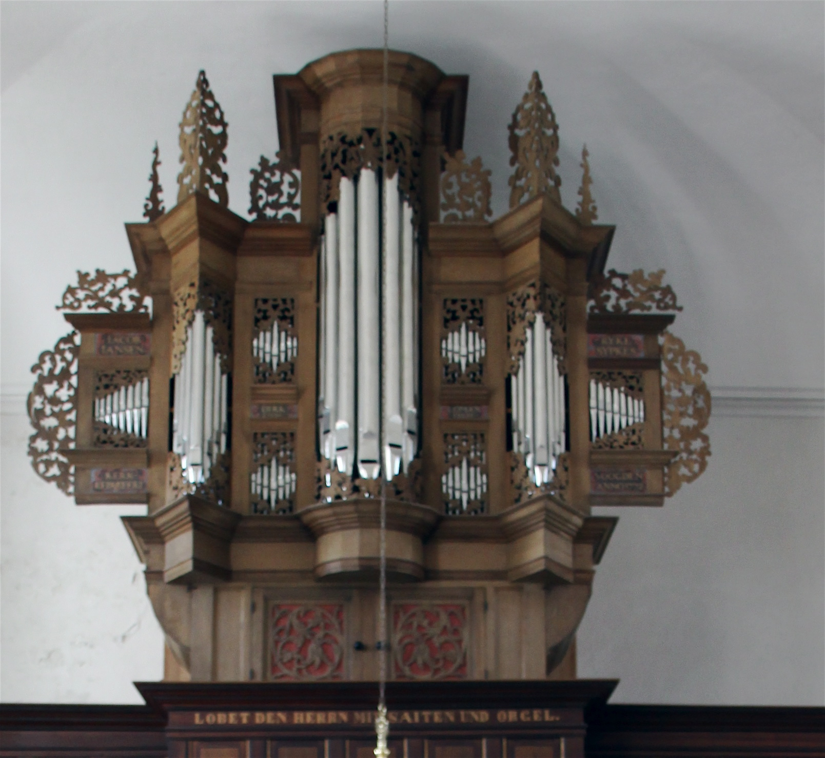 Kreuzkirche Pilsum- Orgel